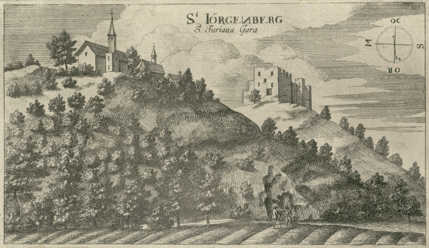 Grad Šentjurjeva Gora v Valvasorjevi topografiji iz leta 1679